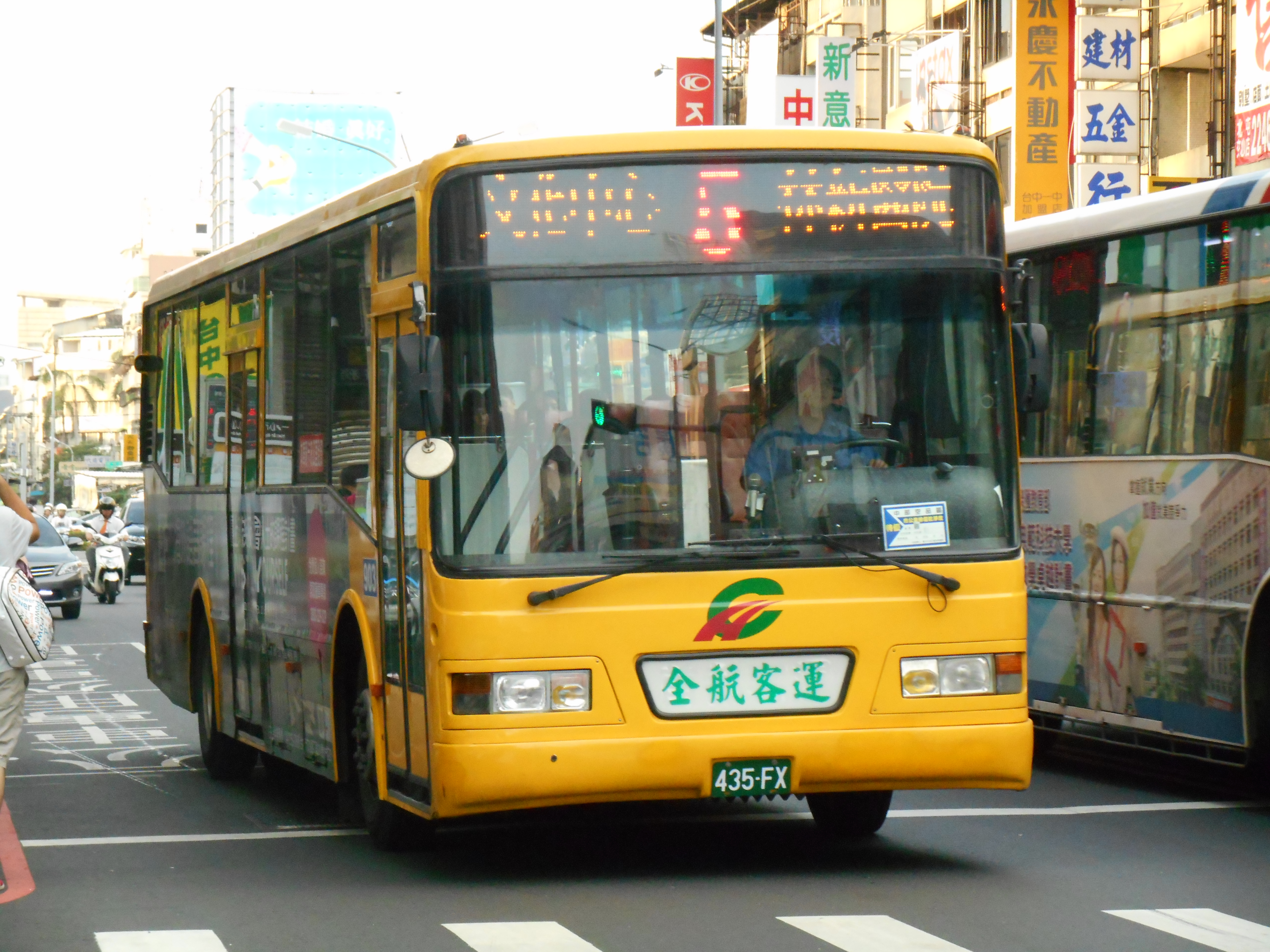 2005(2012) HINO ERK2JRL(固特)